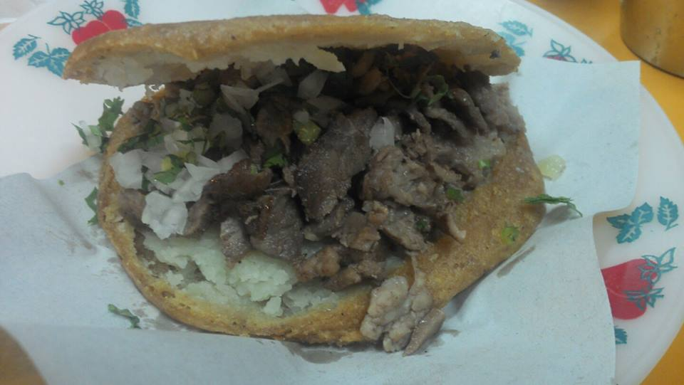 Platillo mexicano a base de maíz, relleno de papa y bistec asado.